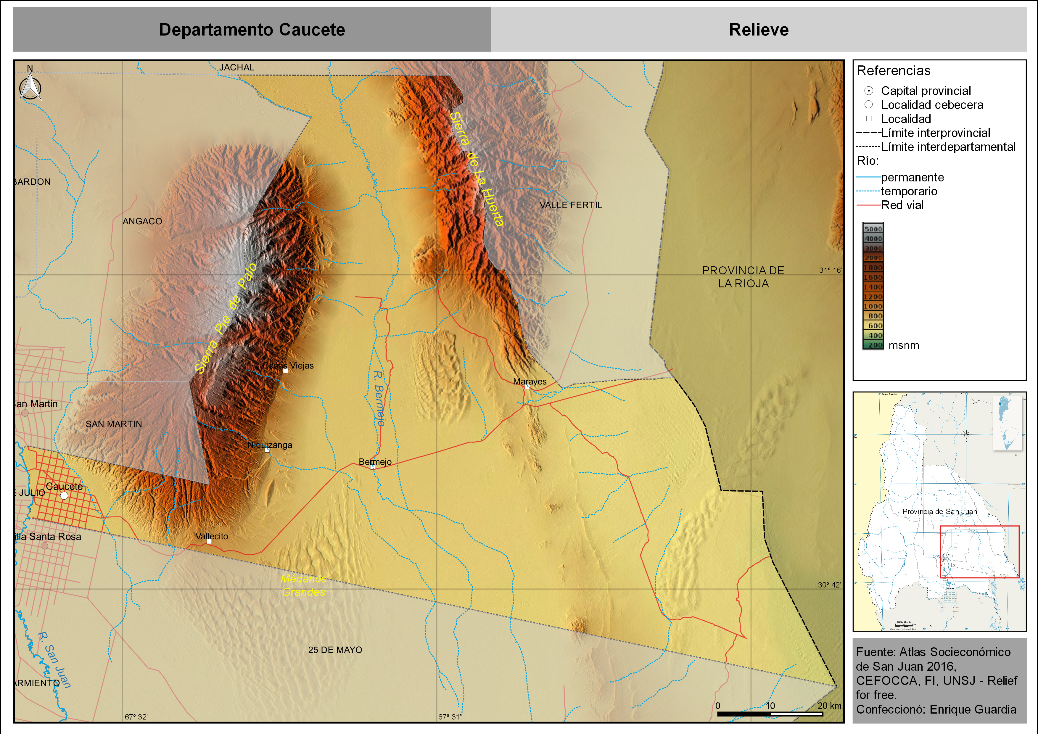 Mapa con la distribución del relieve del departamento Caucete, provincia de San Juan, Argentina.